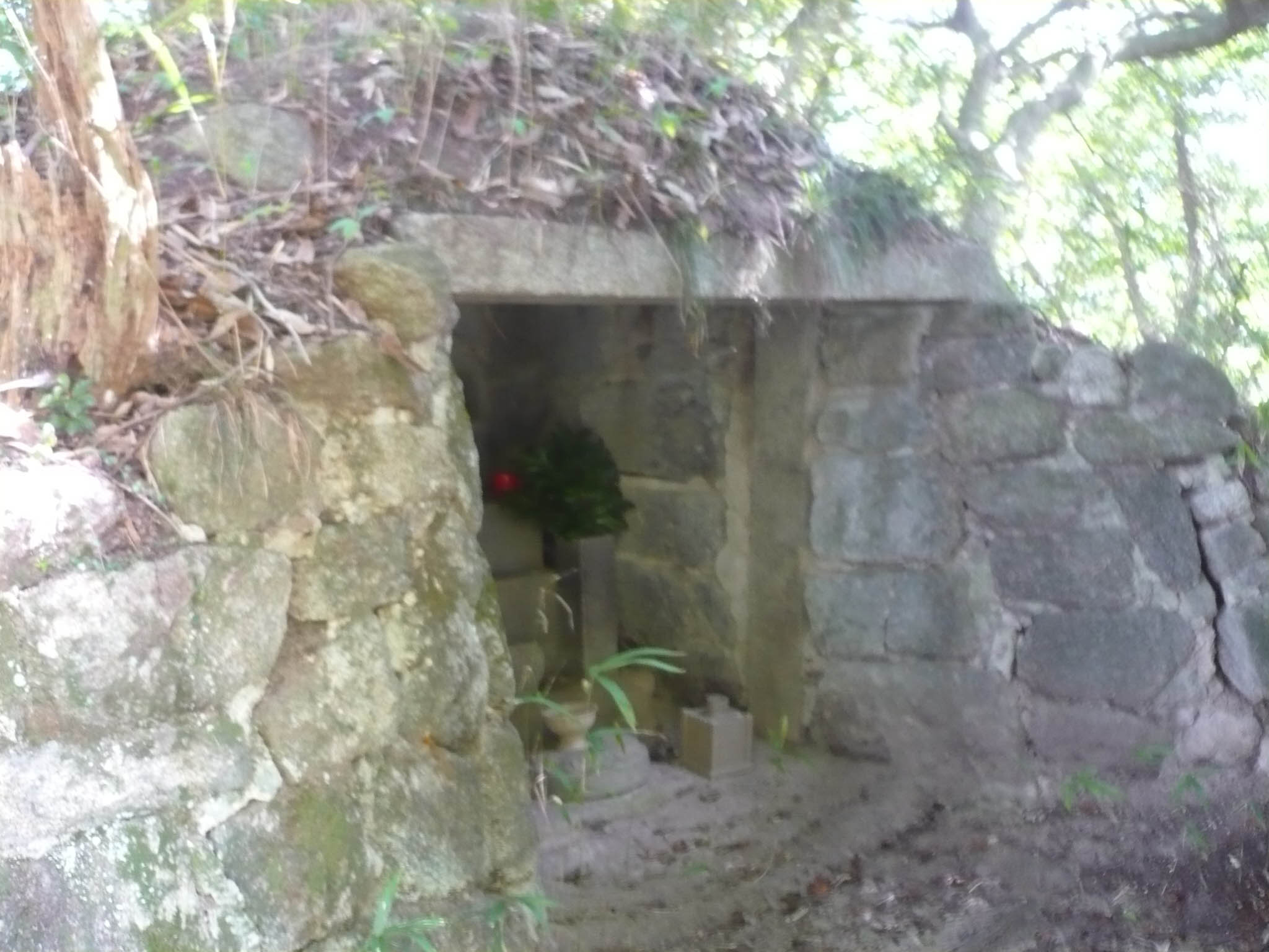 奥之院狸谷不動院